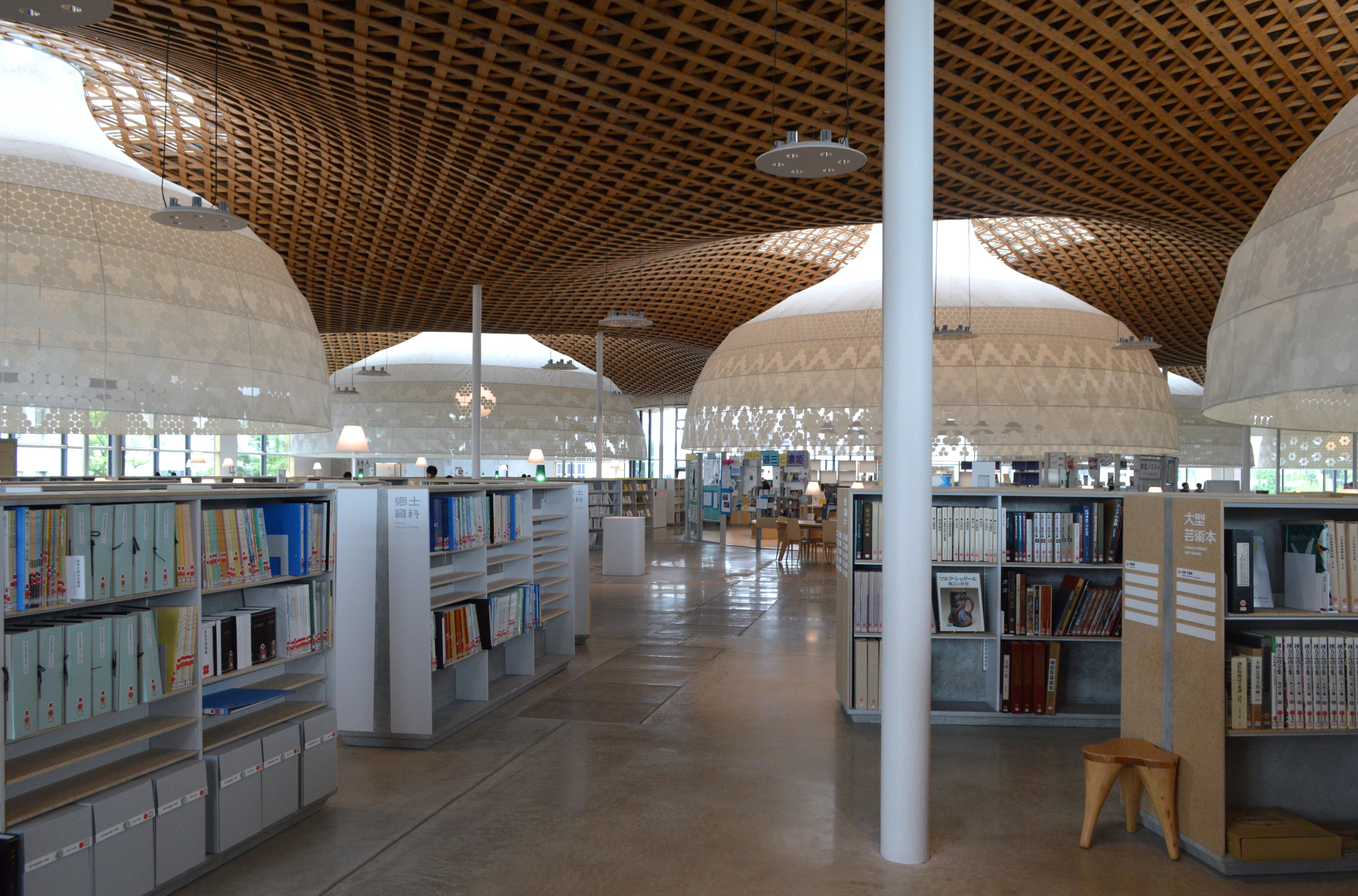 岐阜県岐阜市にあるみんなの森 ぎふメディアコスモス2階の岐阜市立中央図書館。